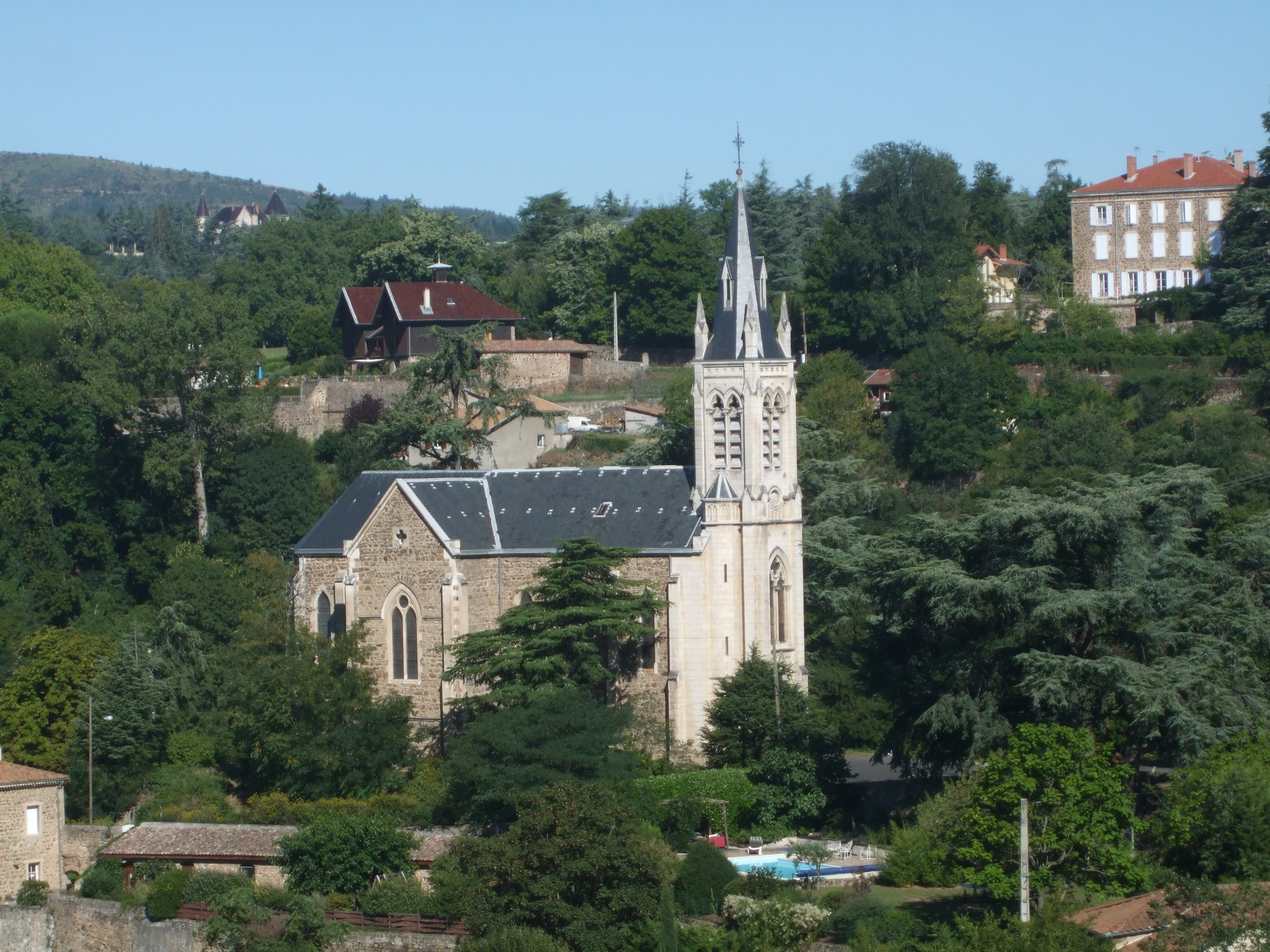 église de la cité papetière de Vidalon